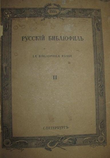 Обложка журнала "Русский Библиофил" за 1914 г.